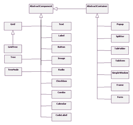 class rialto